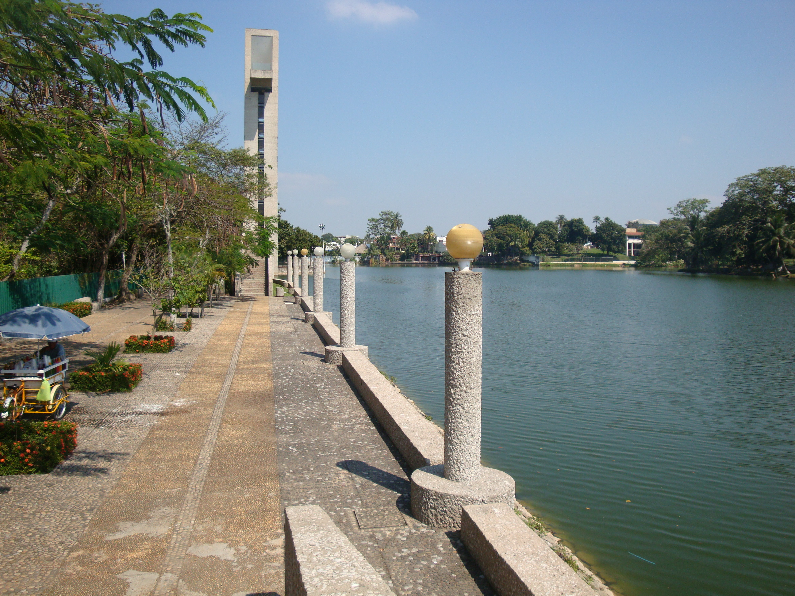 Malecón peatonal del Parque Tomás Garrido y la laguna de Las Ilusiones. Ciudad de Villahermosa, Tabasco, México.